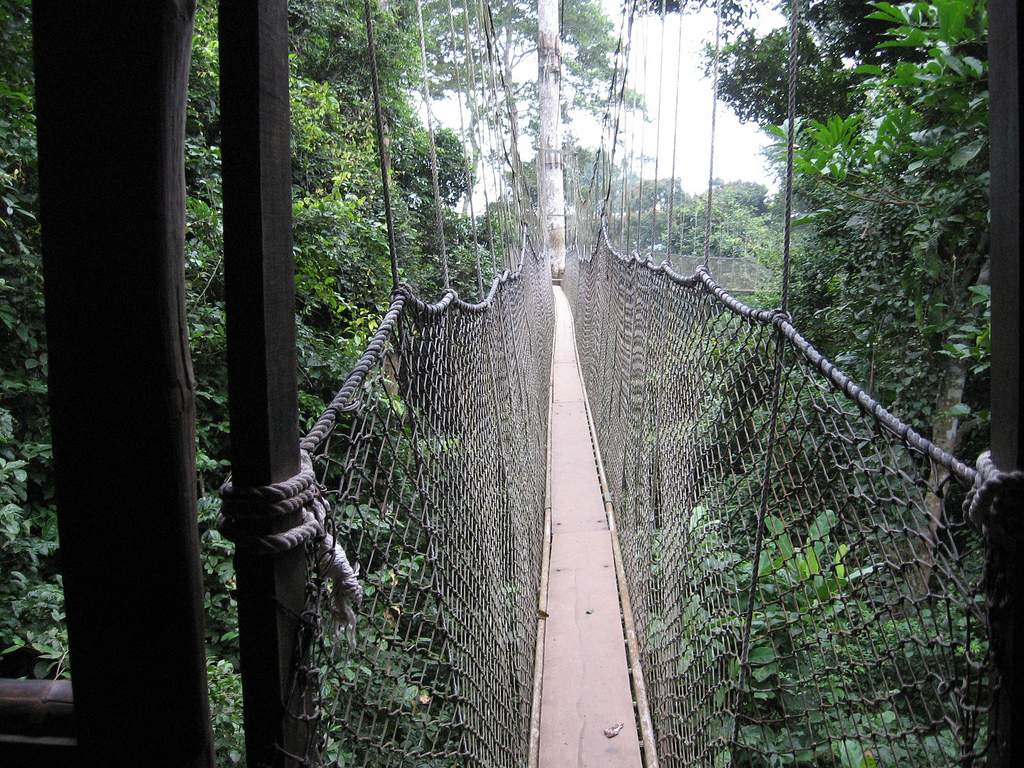 Canopy Walk at Kakum National Park (en) in Ghana